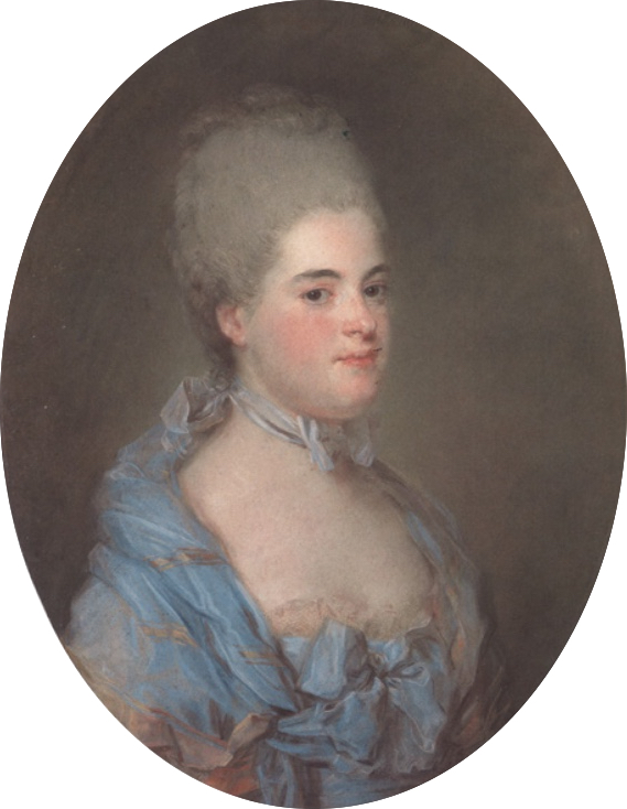 Mme Augustin-Prosper Tassin de La Renardière, née Madeleine-Monique Seurrat de La Barre (1744–1820)